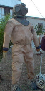 Ronilačka oprema sa početka XX.st. za vađenje spužava u Krapnju, Šibenik, Hrvatska. Fotografirana na proslavi 300-te obljetnice spužvasrtva na Krapnju.